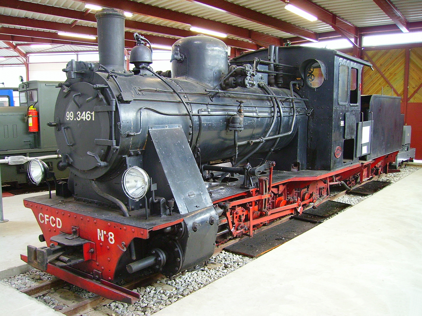 La 040 N°8 (Vulcan-Werke N°3852 de 1925) du Chemin de fer Froissy-Cappy-Dompierre le 27 Mai 2007.